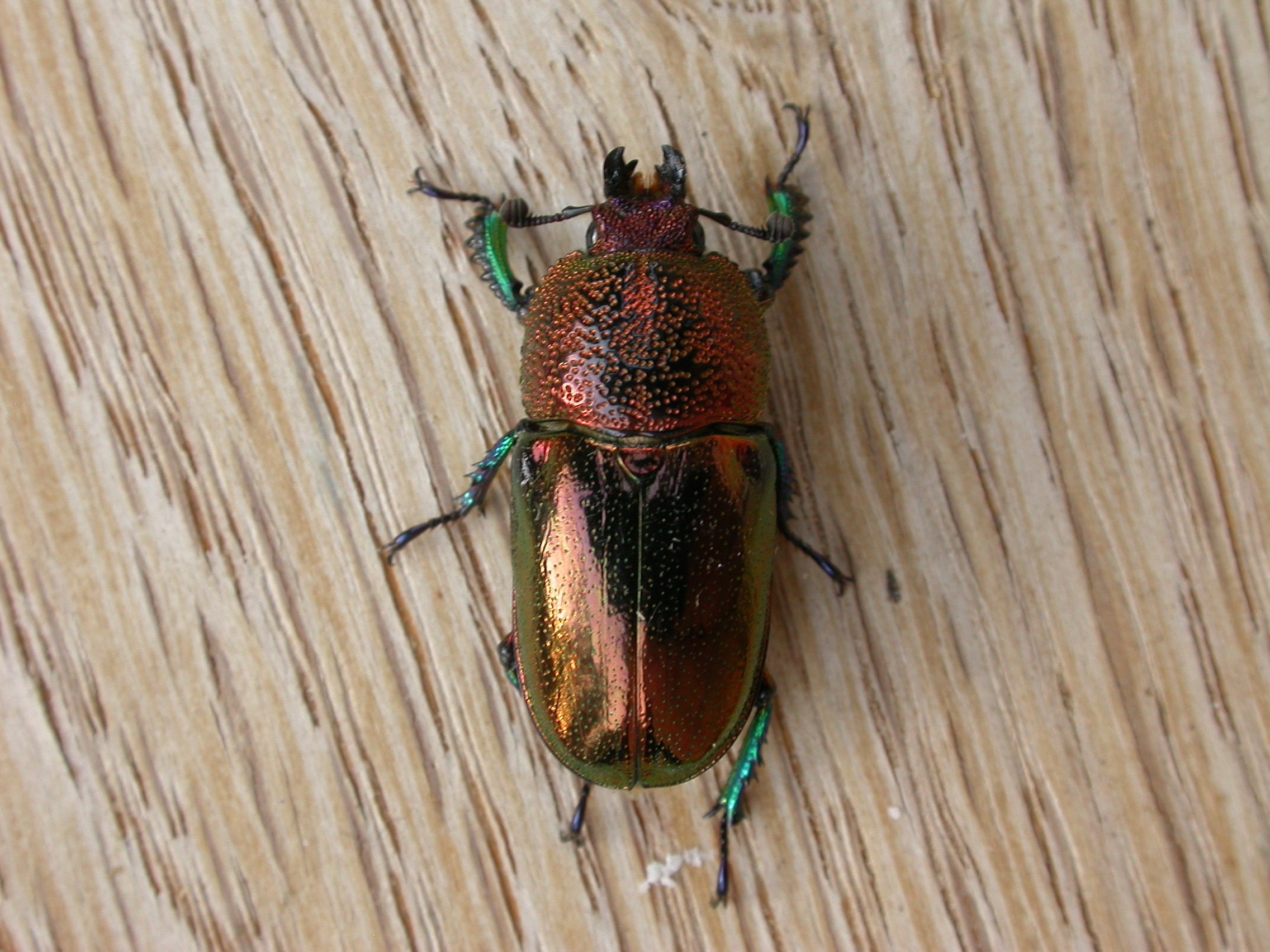 Lamprima aurata Latreille, 1817, female, Deakin, ACT, 8 December 2011